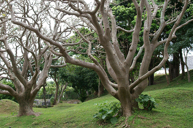 デイゴ（沖縄県那覇市） Erythrina variegata (Naha, Okinawa, JAPAN)